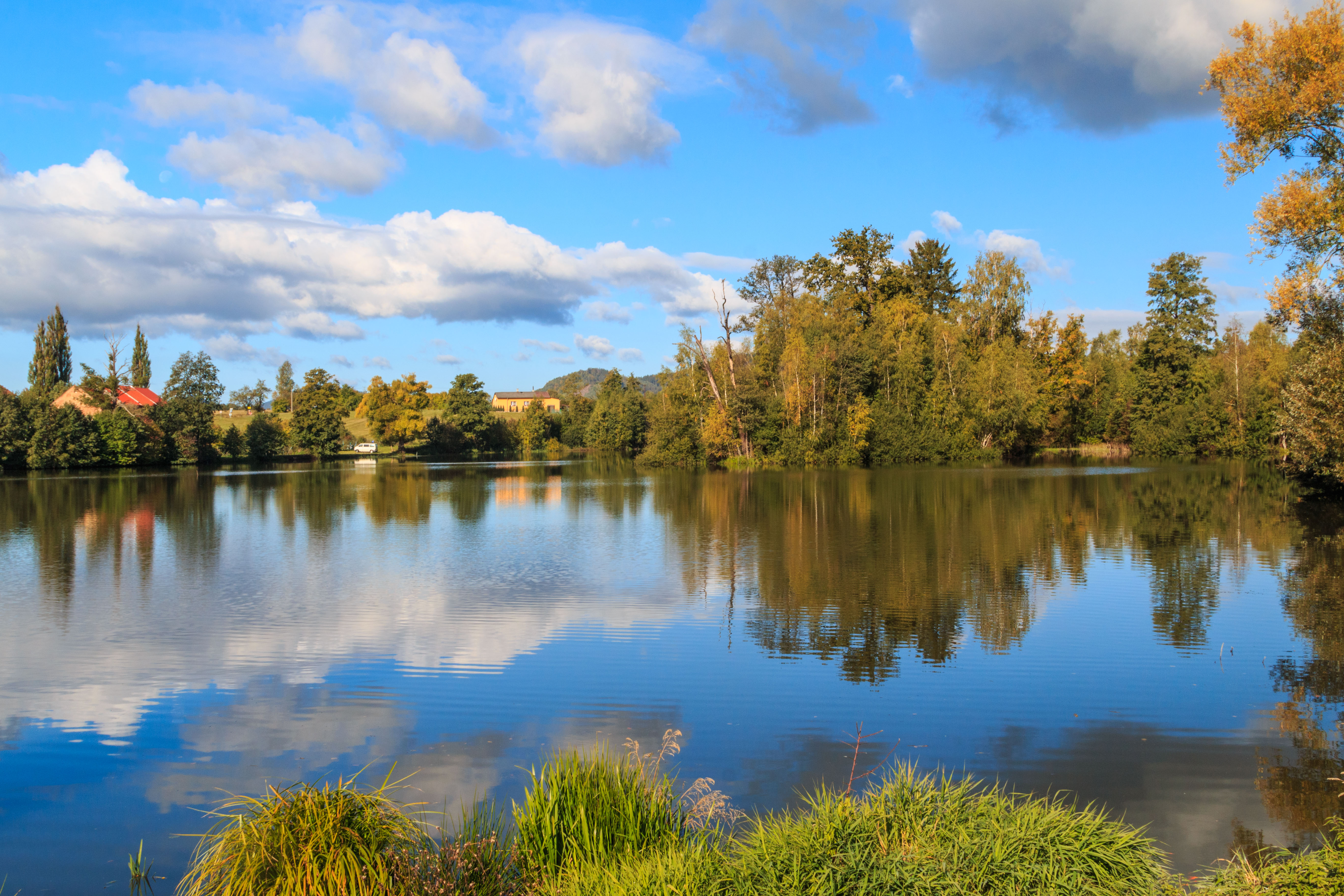 Mlýnský rybník v Jablonném v Podještědí Project: Vodstvo.